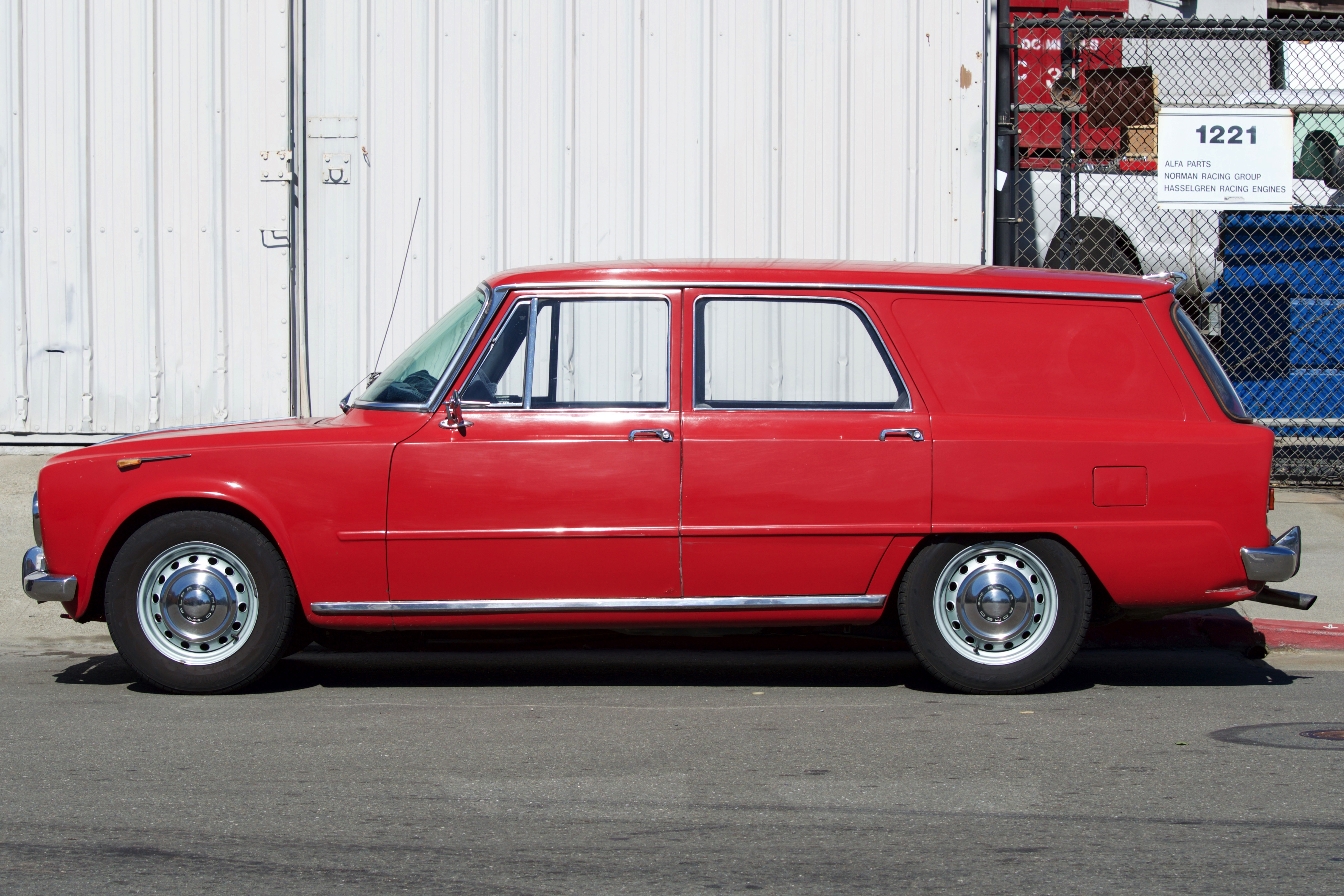 _ALFA_G_DSC_0495